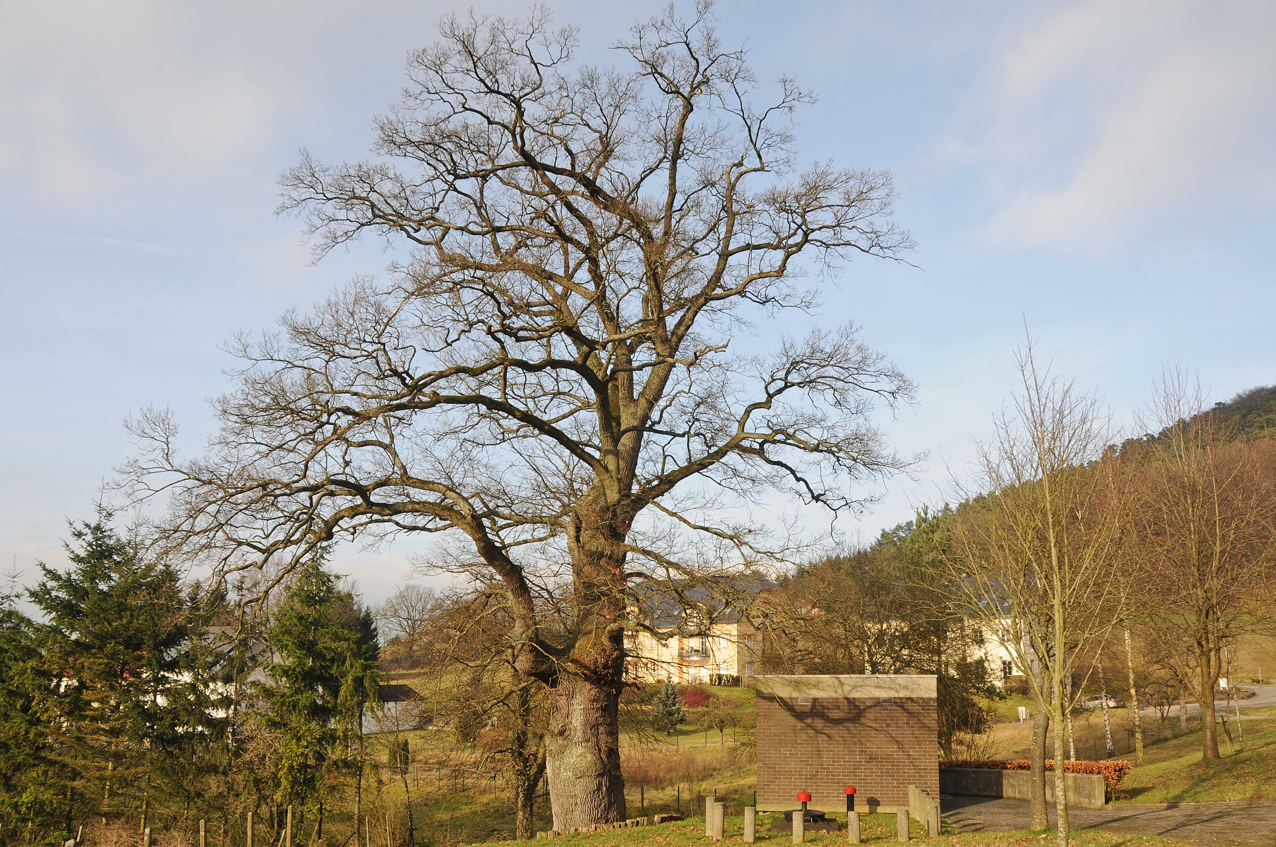 Eech zu Kaalmes.